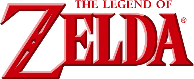 Logo de la Saga de The Legend of Zelda